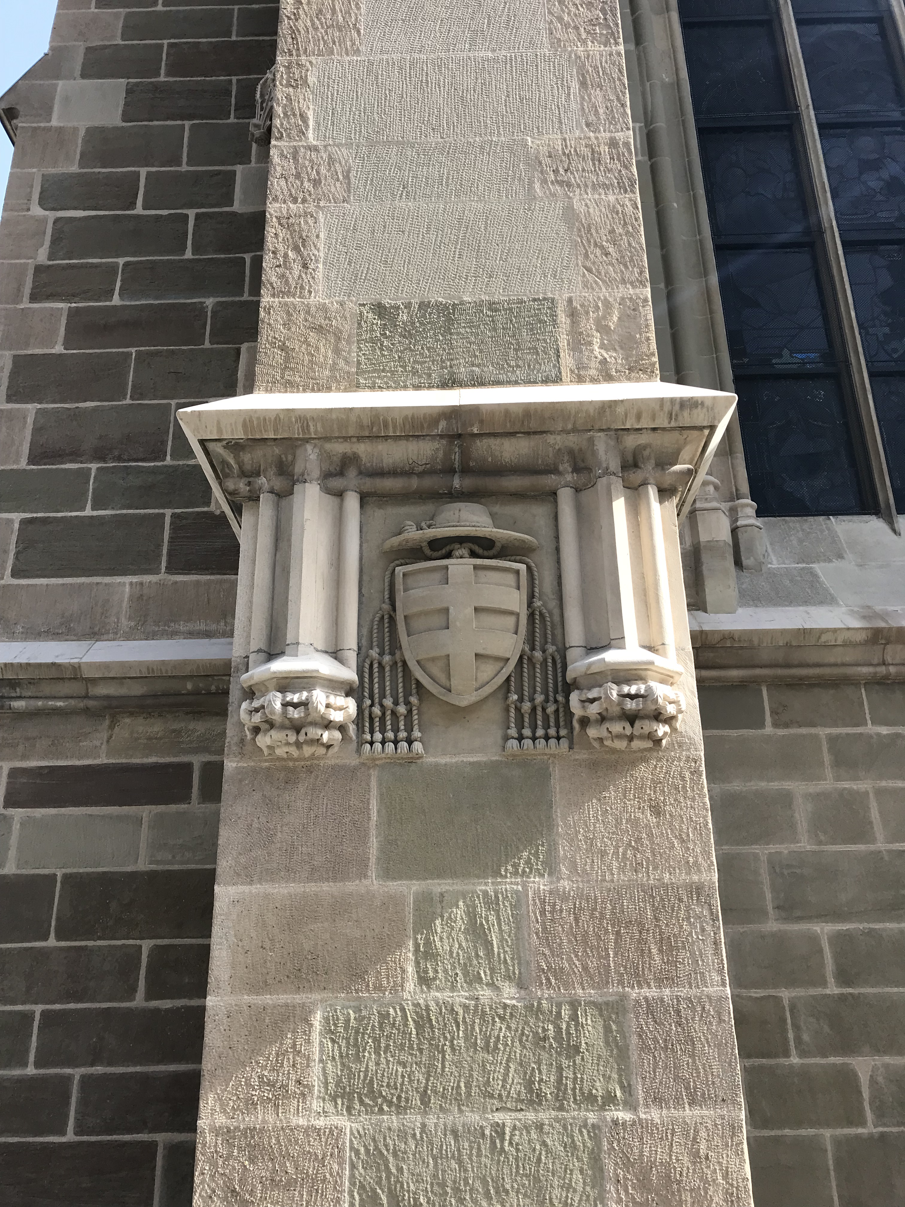 Cathédrale Saint-Pierre de Genève.